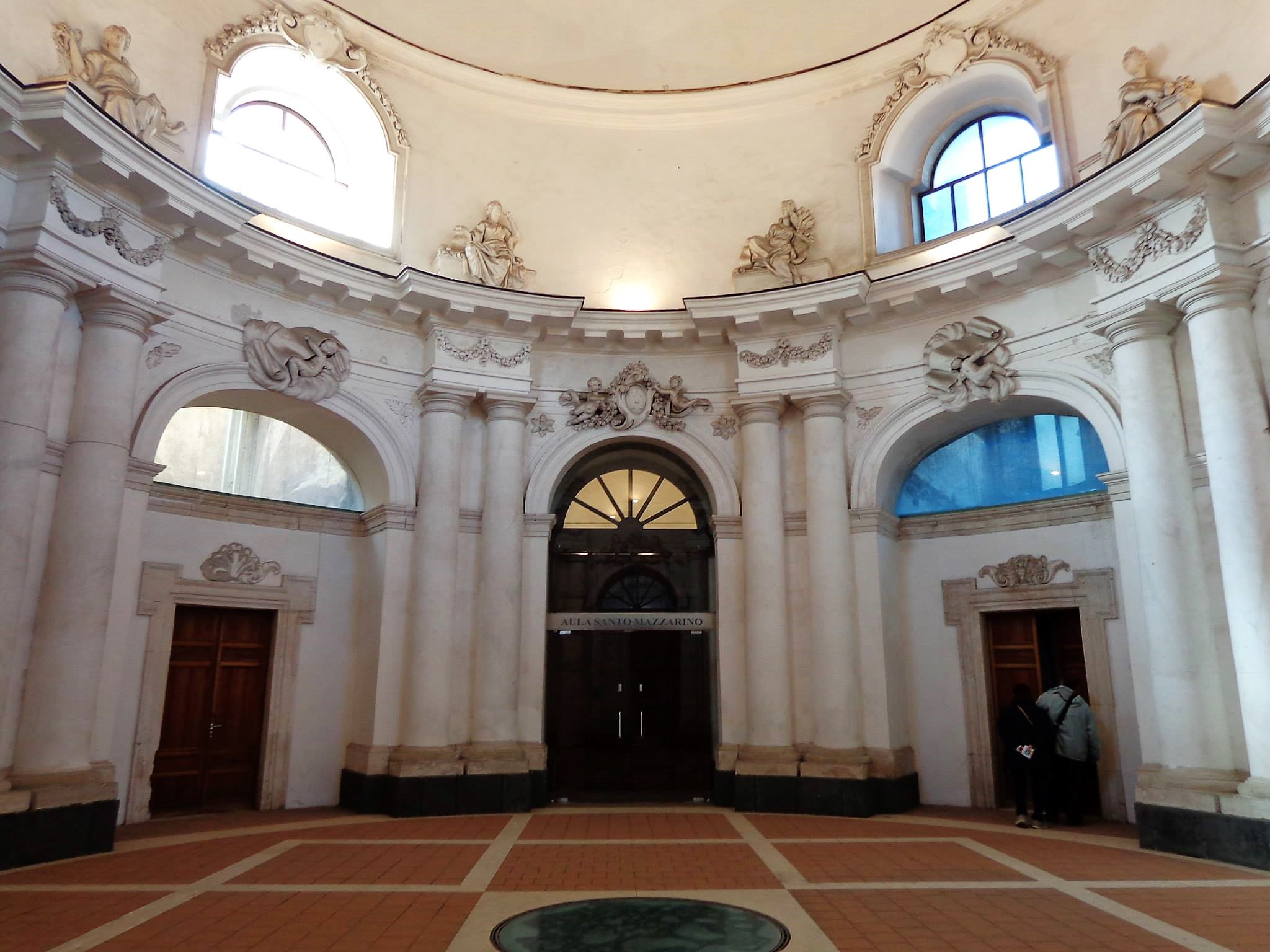 Interno monastero